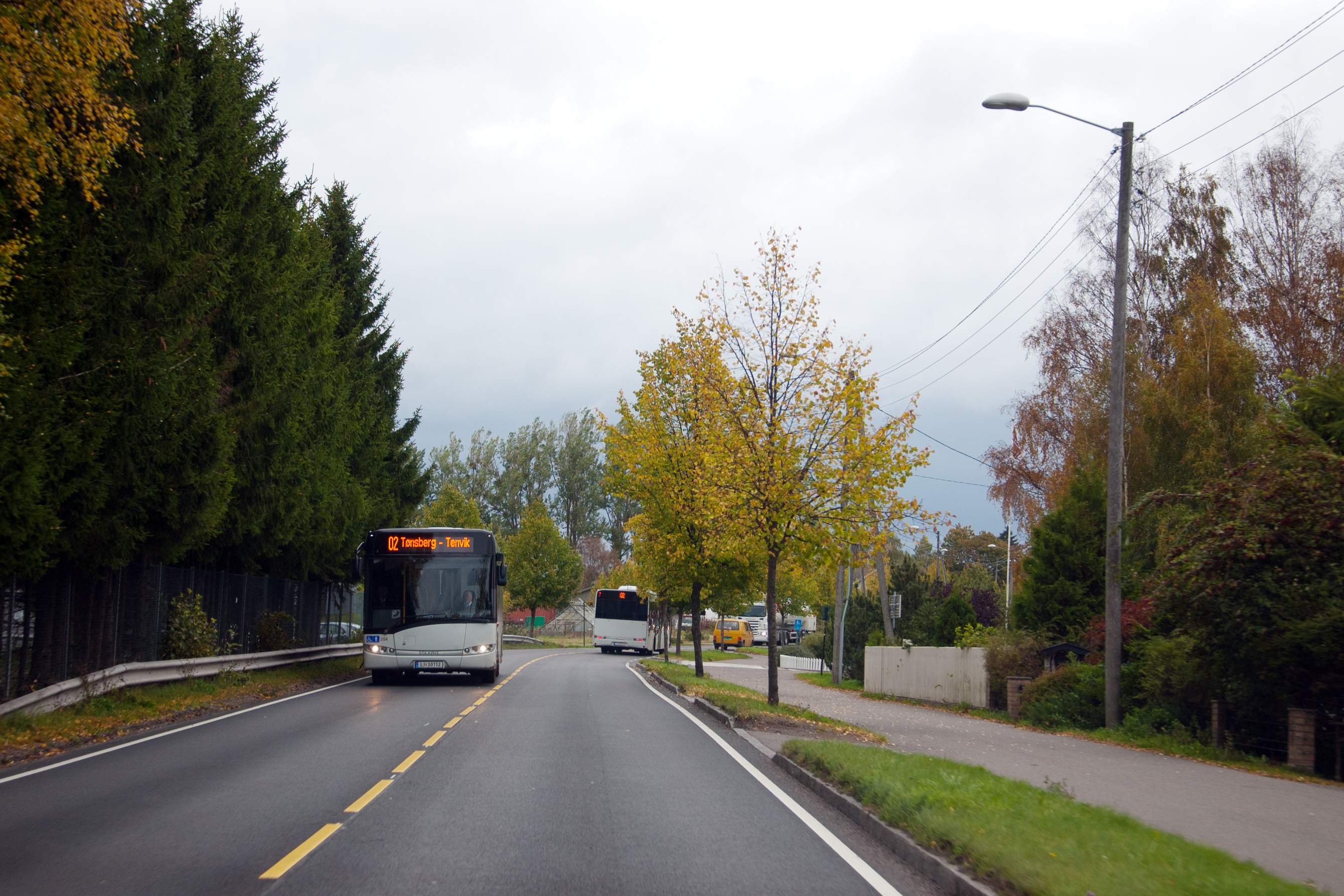 Fylkesvei 715 Borreveien i Horten, Vestfold.